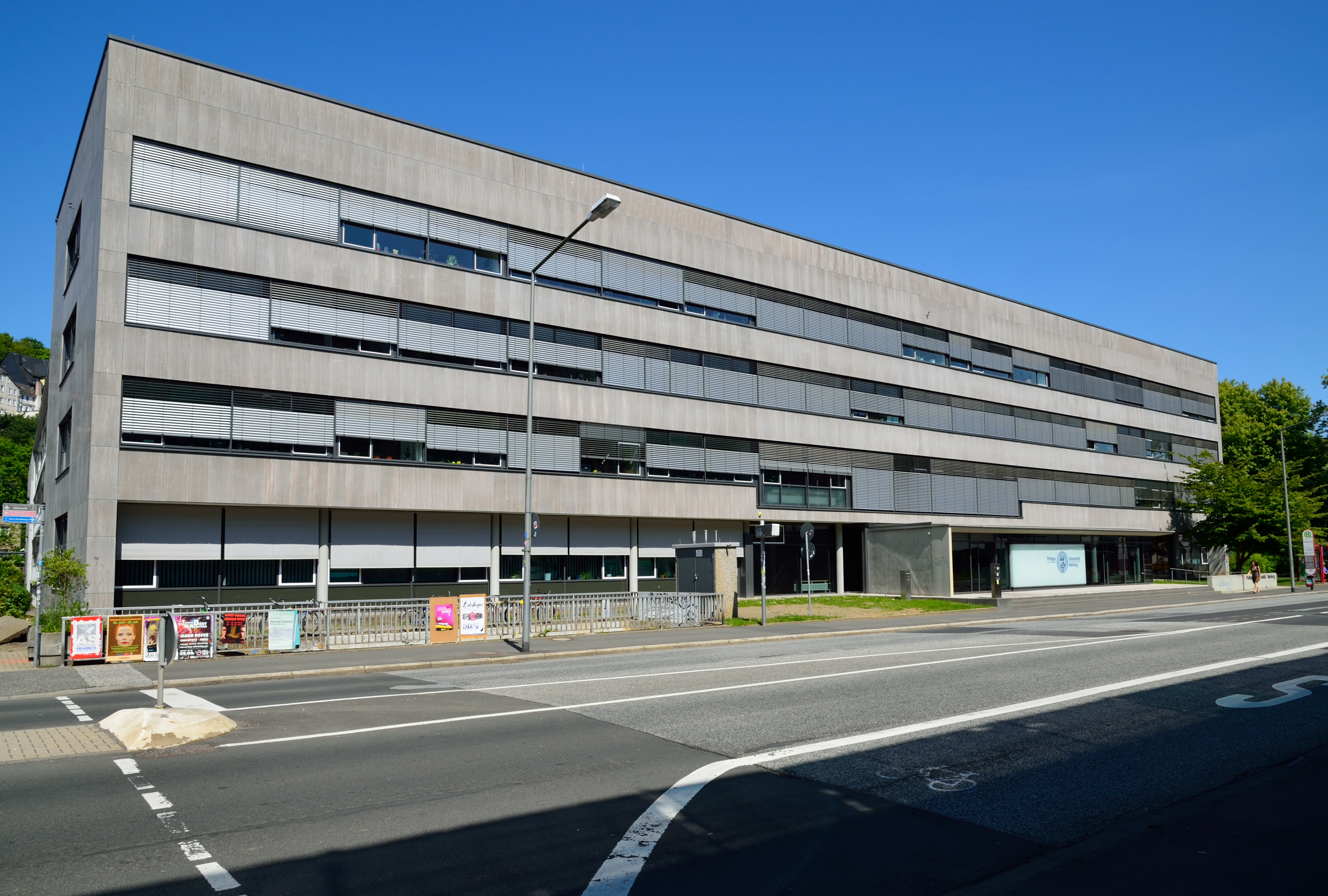 Studierendensekretariat der Universität Marburg